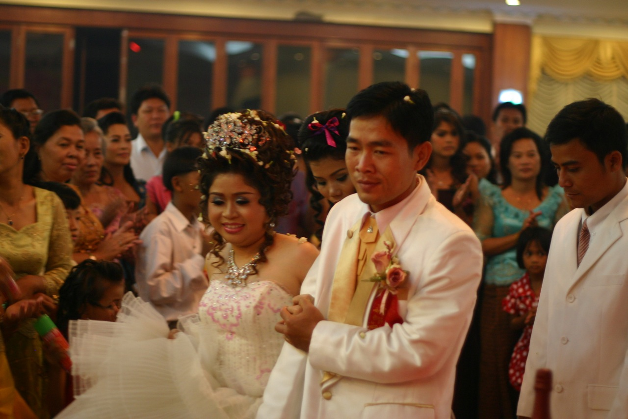 Cambodian wedding